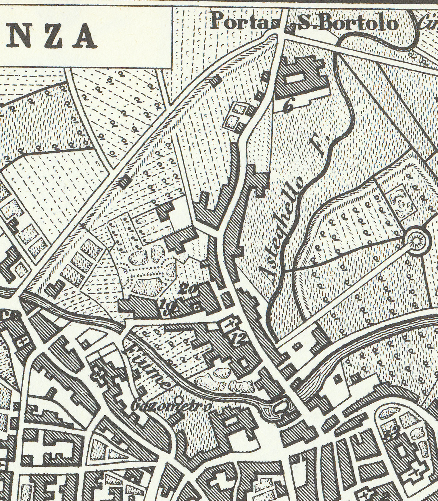 Mappa di Vicenza in Atlante Vallardi, 1880 - particolare del Borgo Pusterla